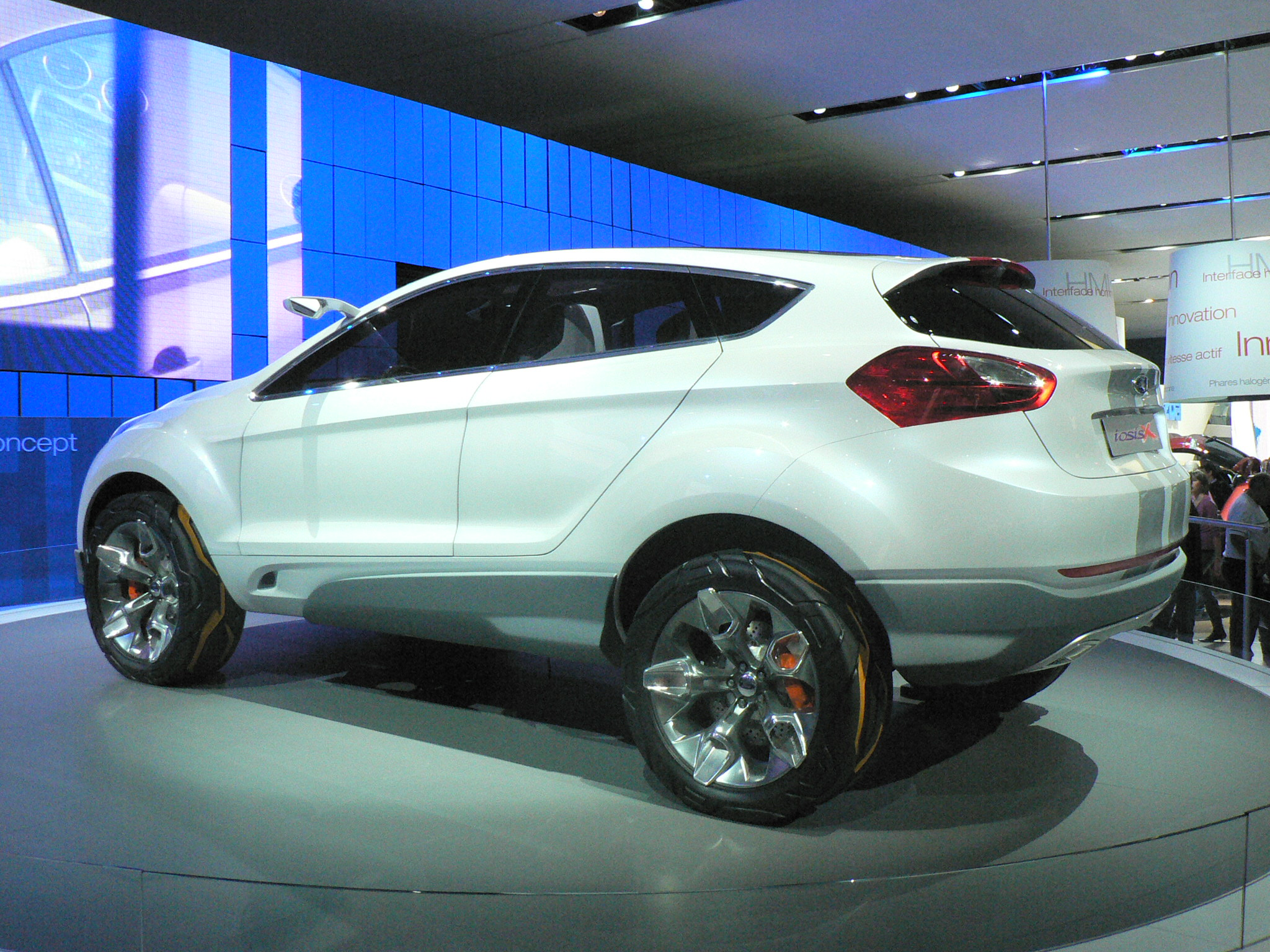 Mondial de l'automobile, Paris 2006